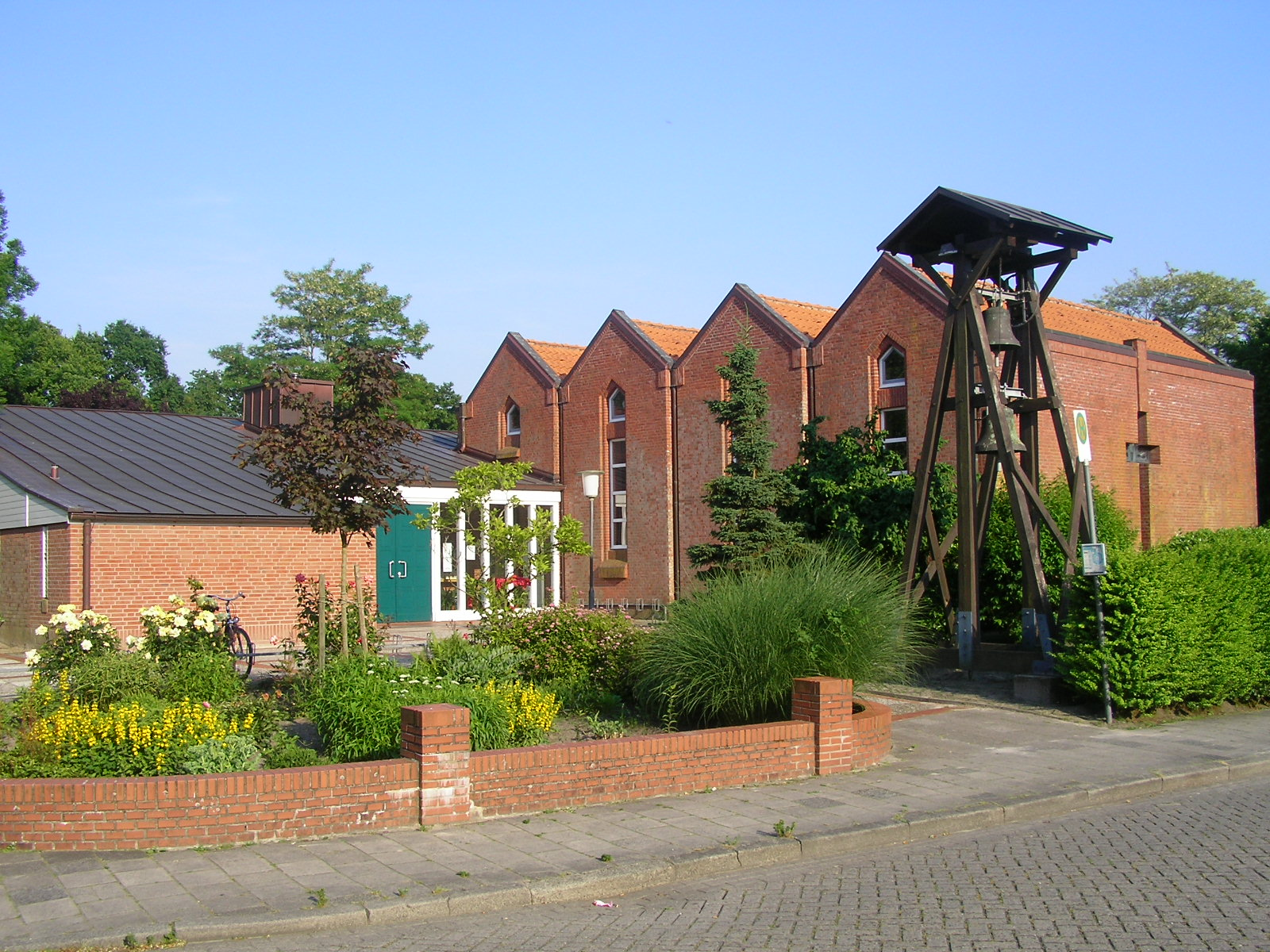 Paulusgemeinde Aurich-Kirchdorf